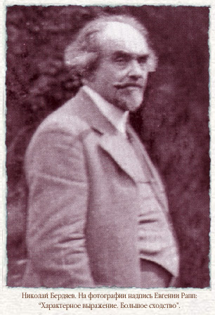 Фото Николая Бердяева